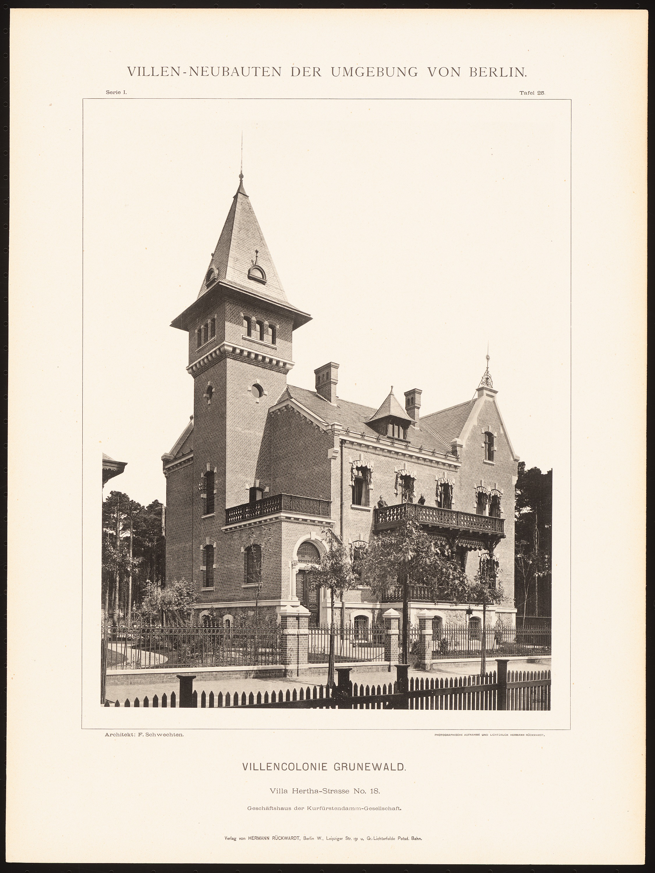 Schwechten Franz (1841-1924), Geschäftshaus der Kurfürstendamm-Gesellschaft, Berlin-Grunewald. (Aus: Hermann Rückwardt, Villen-Neubauten der Umgebung von Berlin): Ansicht. Foto auf Karton, 50 x 37,5 cm (inkl. Scanrand). Architekturmuseum der Technischen Universität Berlin Inv. Nr. B 3255,26.